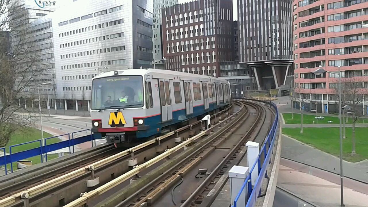 RET Metro Type T 5203-5243-5210-5221 op Rijnhaven